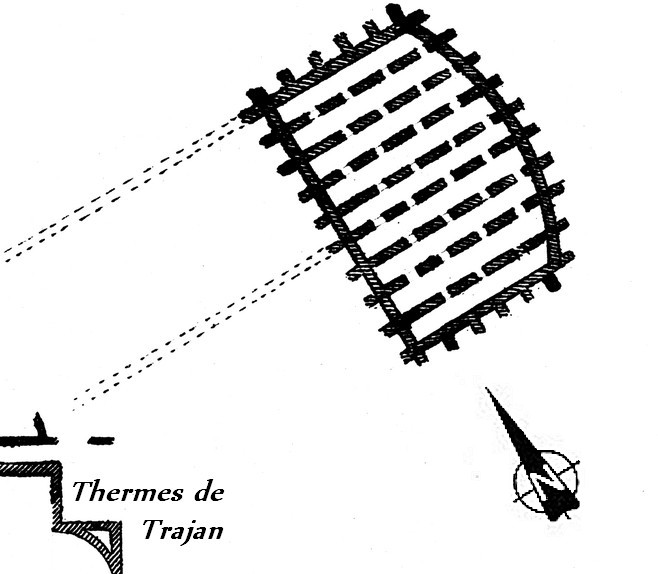 Plan des Sette Salle, citerne-réservoir des thermes de Trajan. D'après un plan des thermes de Giovanni Battista Piranesi (1720–1778) daté de 1756.